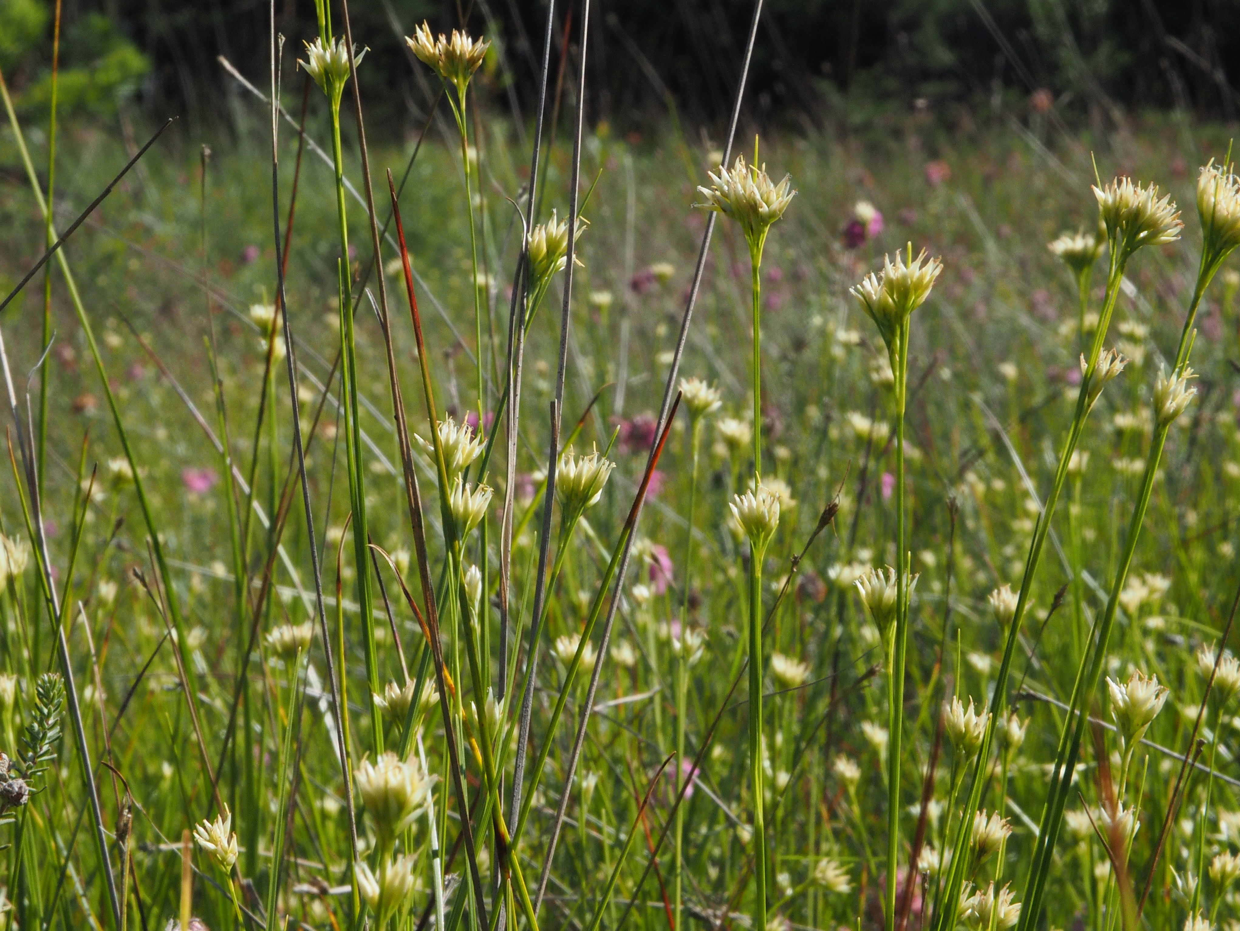 Weißes Schnabelried (Rhynchospora alba) im Becklinger Moor, Niedersachsen, Germany